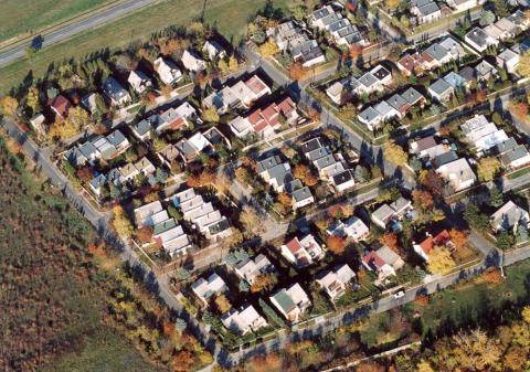 Feriejaj domoj de Balatonakali.